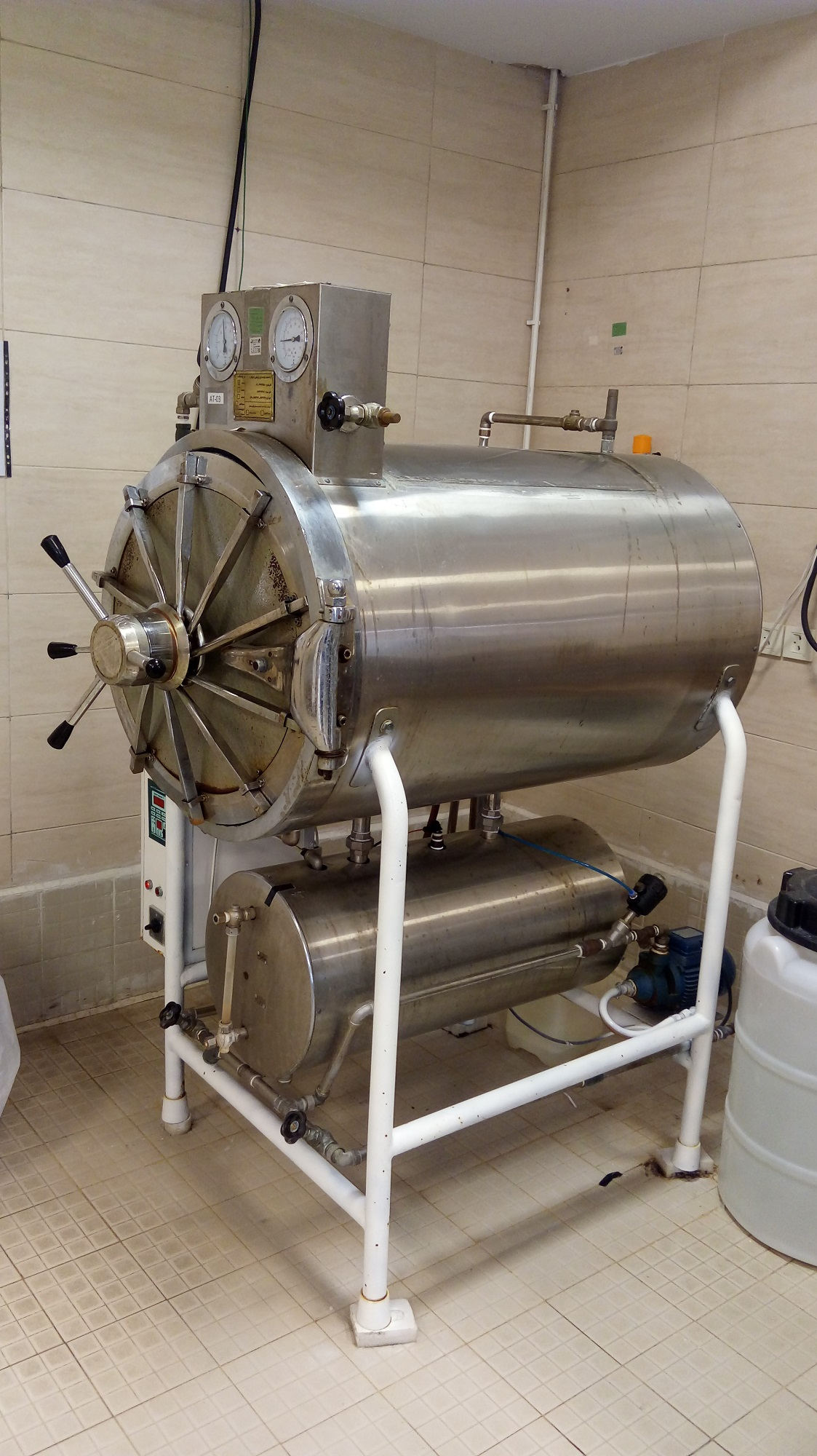 اتوکلاو جهت استریل کردن تجهیزات پزشکی